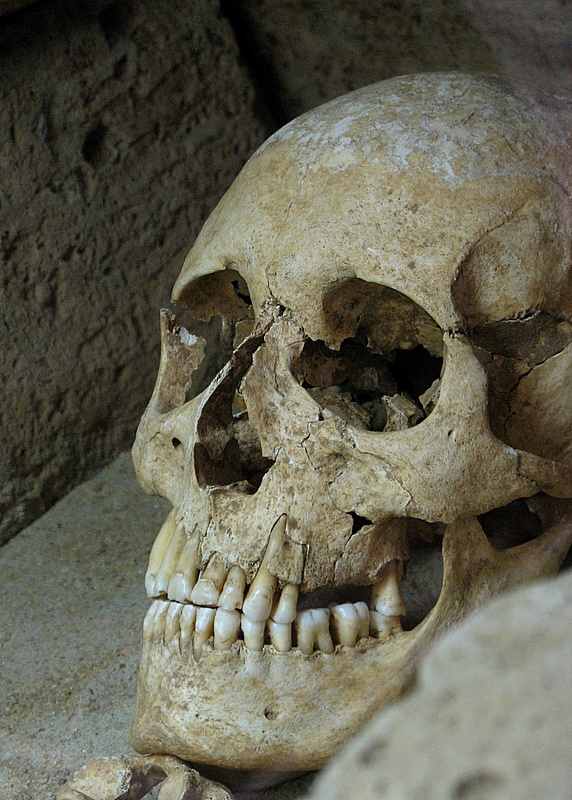 Otto von Linn im Museum Linn in Krefeld